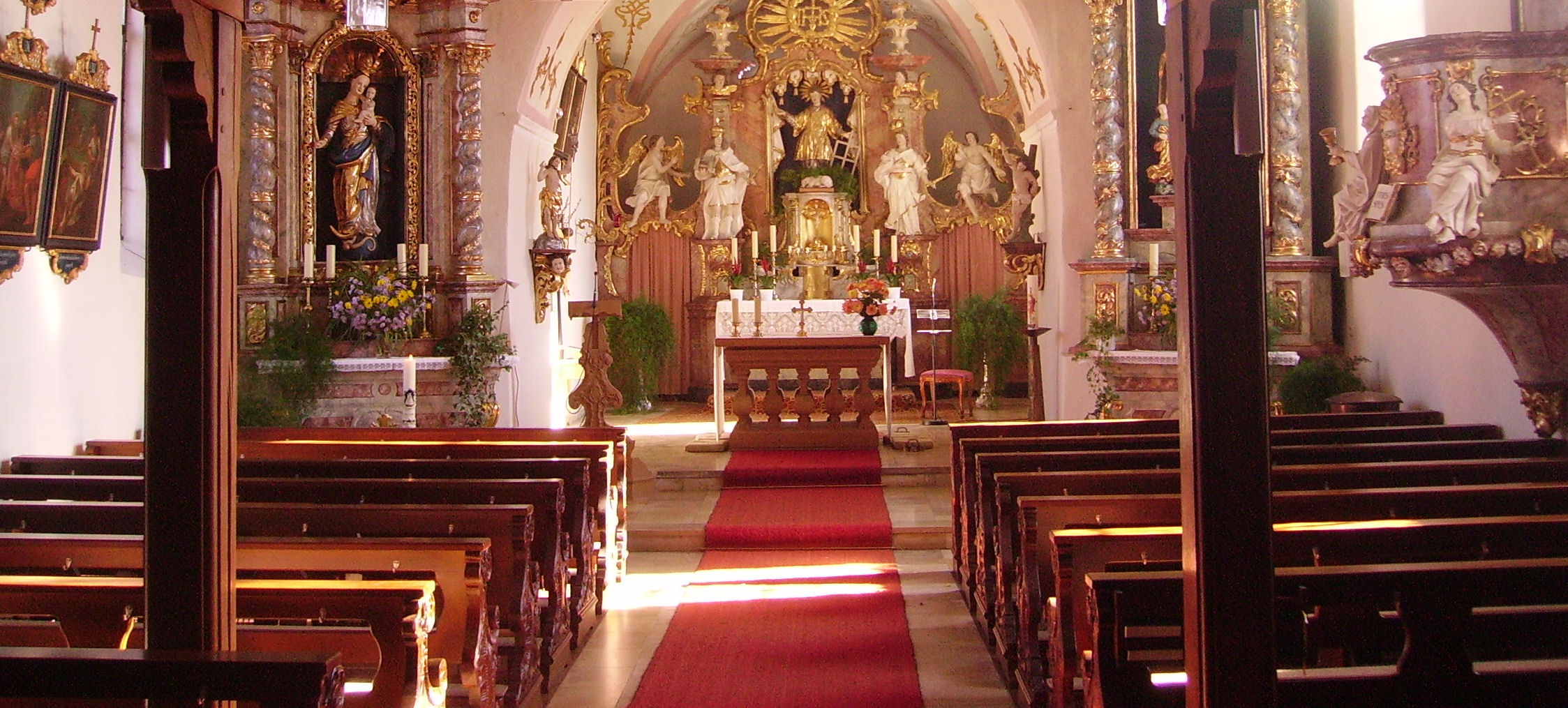 view of Hohenpölz, part of Heiligenstadt in Oberfranken in Upper Franconia, Germany